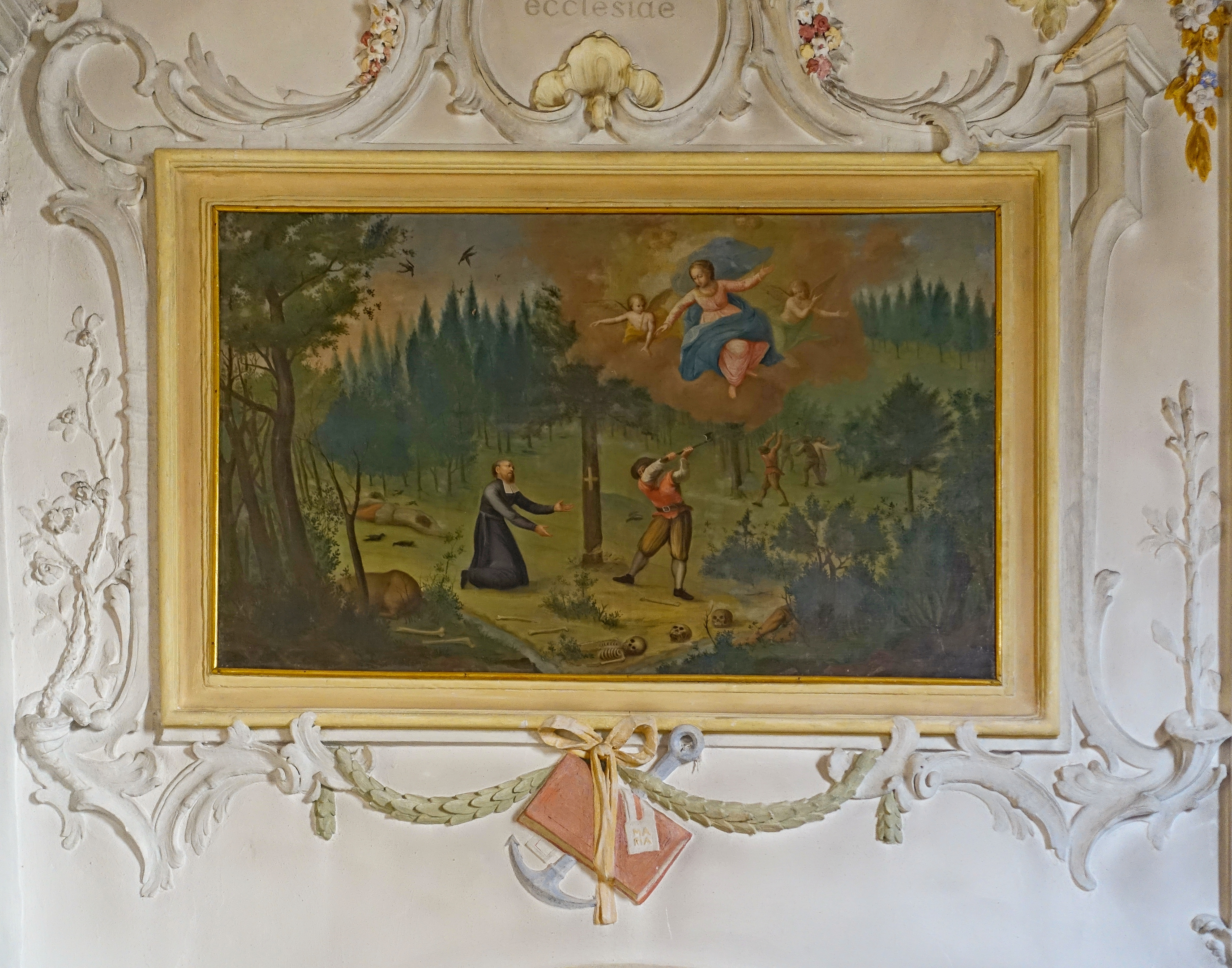 Wandbild Gründungsgeschichte 1255 soll dem Leutpriester Dietrich von Rickenbach die Gottesmuter erschien sein und wurde von ihr beauftragt, die mit einem Kreuz bezeichnete Tanne zu fällen und dort eine Kapelle zu errichten, dann werde der Fluch von dieser Gegend nenommen. Daher auch Todt-Moss, ein "grausam pestilenzischer Sumpf".